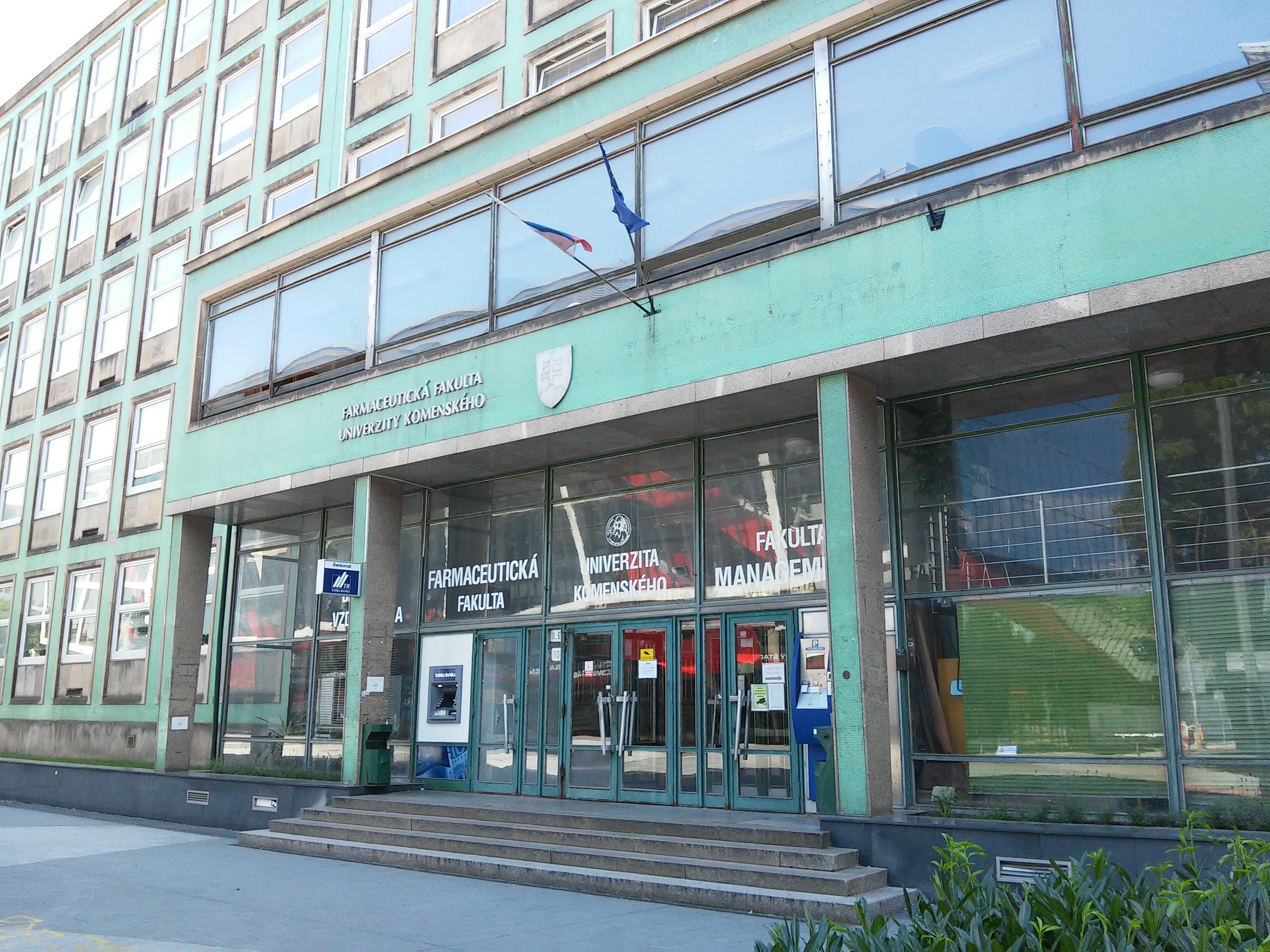 Odbojárov, Nové Mesto, Bratislava